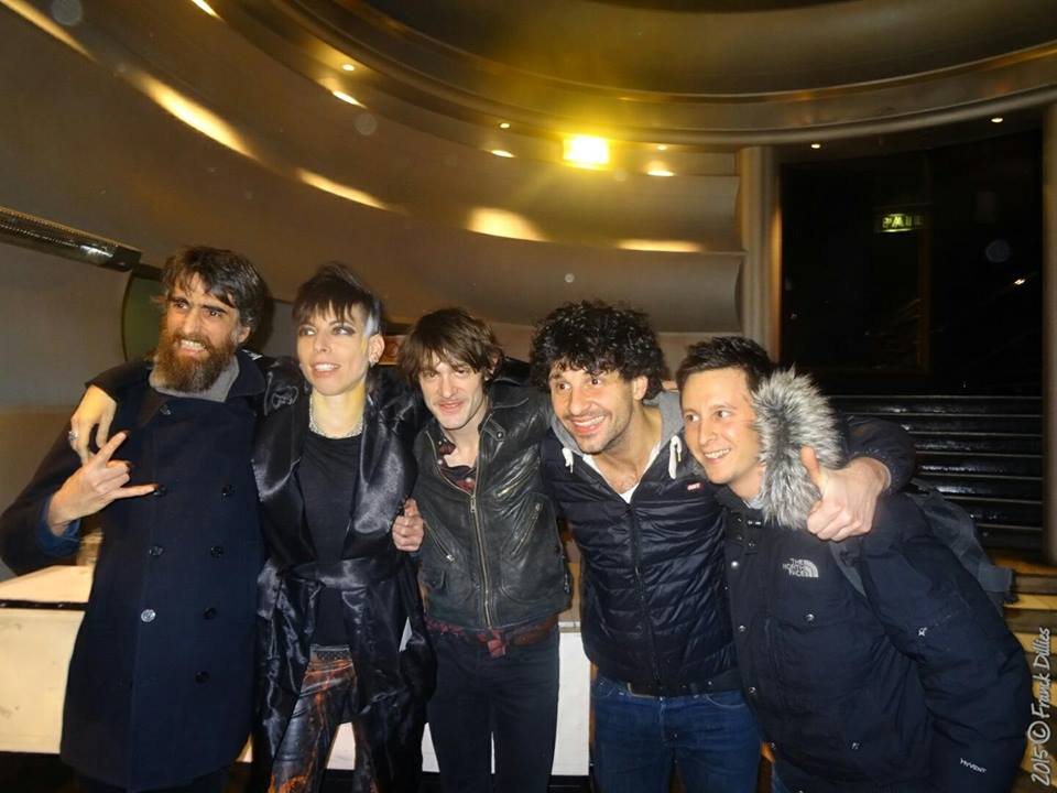 Le groupe de rock français Mademoiselle K au complet (anciens et nouveaux membres) à la Cigale, le 26 janvier 2015. De gauche à droite : Pierre Louis Basset (dit "Pilou"), Katerine Gierak, Pierre-Antoine Combard (dit "Peter"), David Boutherre, et son successeur Colin Russeil